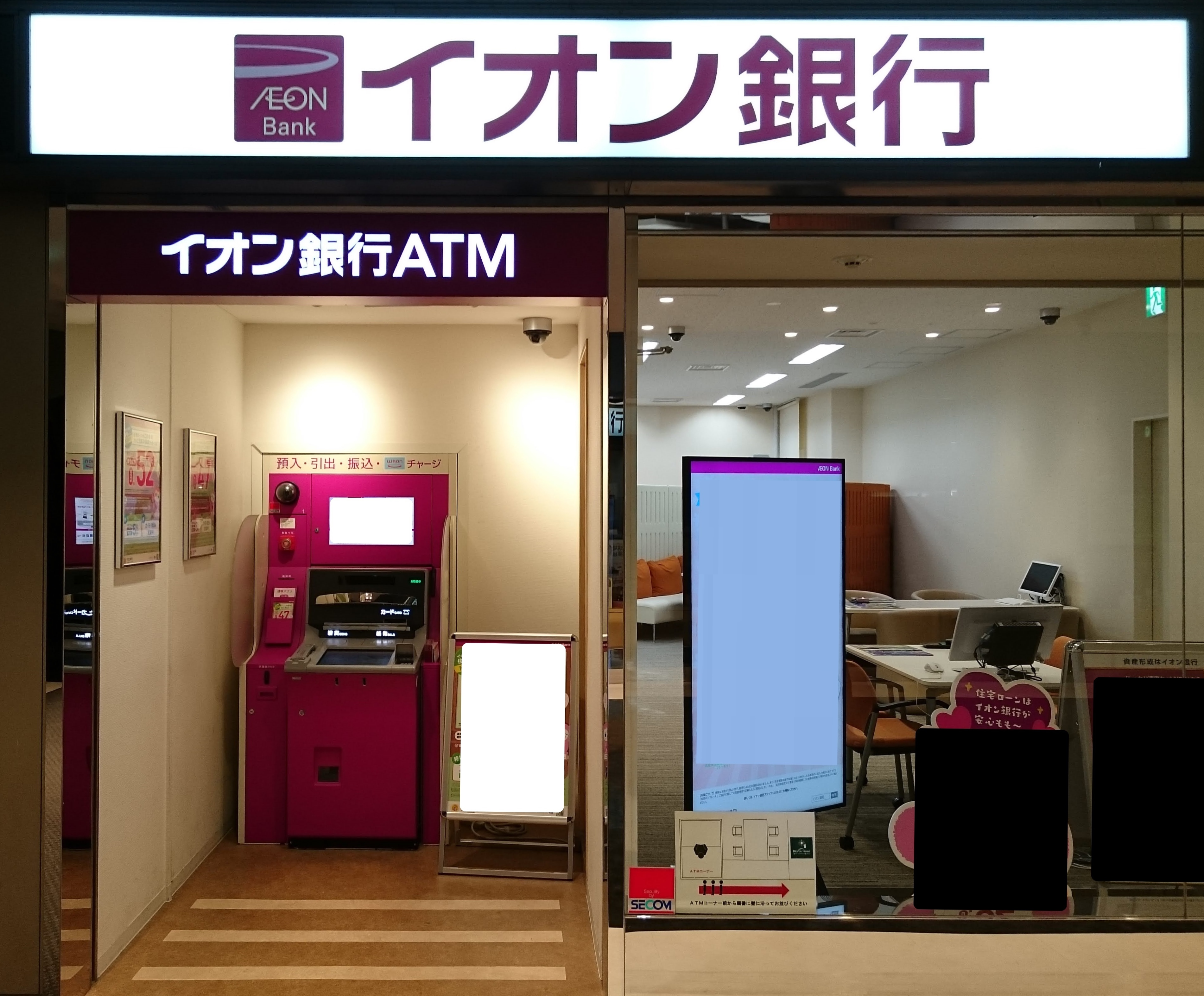 イオン銀行のATMコーナー外観（東京都庁付近の地下にて）